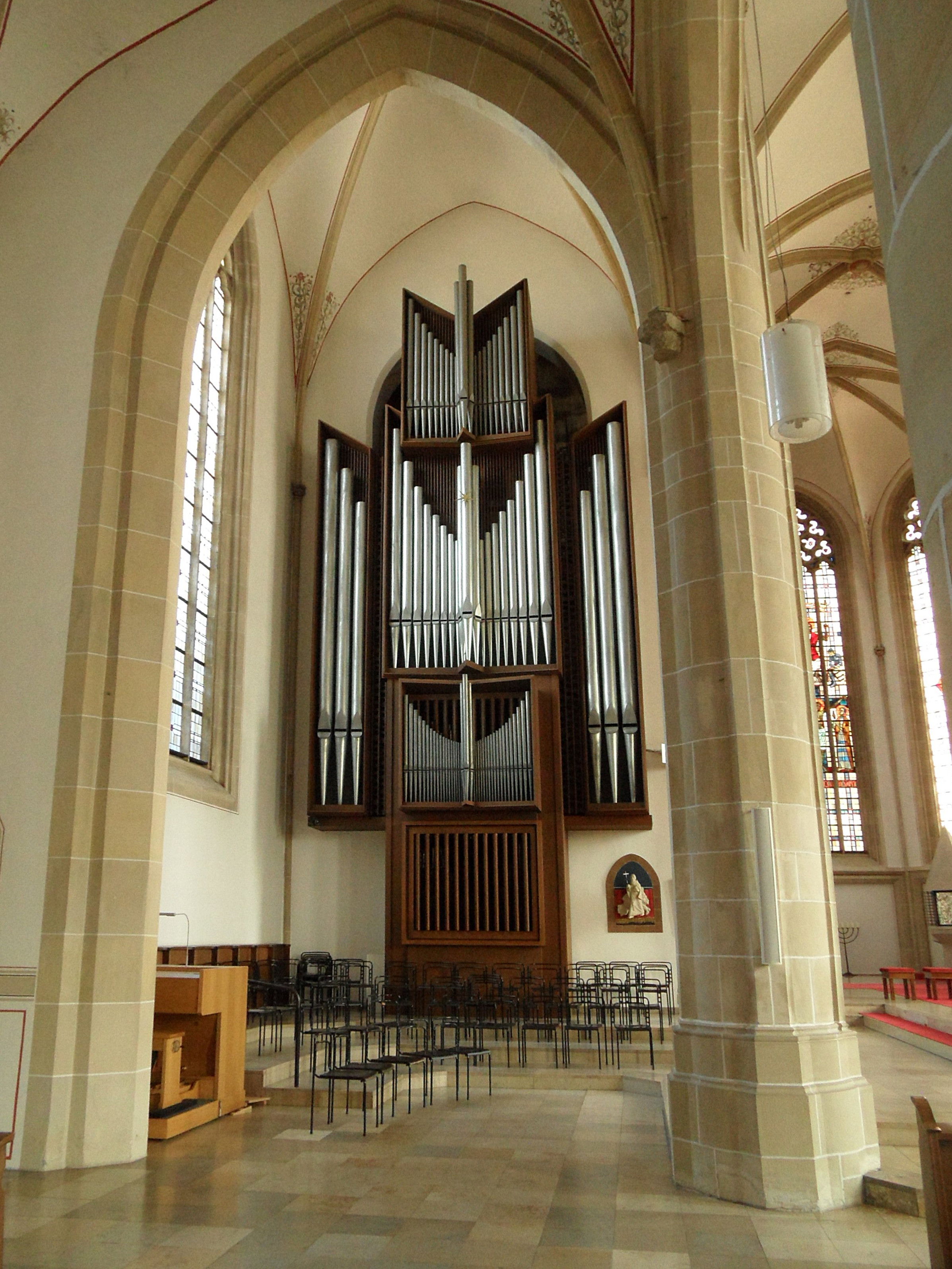 Bocholt: Georgskirche, Orgel der Werkstatt Franz Breil (Erweiterung durch Orgelbaufirma Fleiter), im nördlichem Querhaus; September 2018